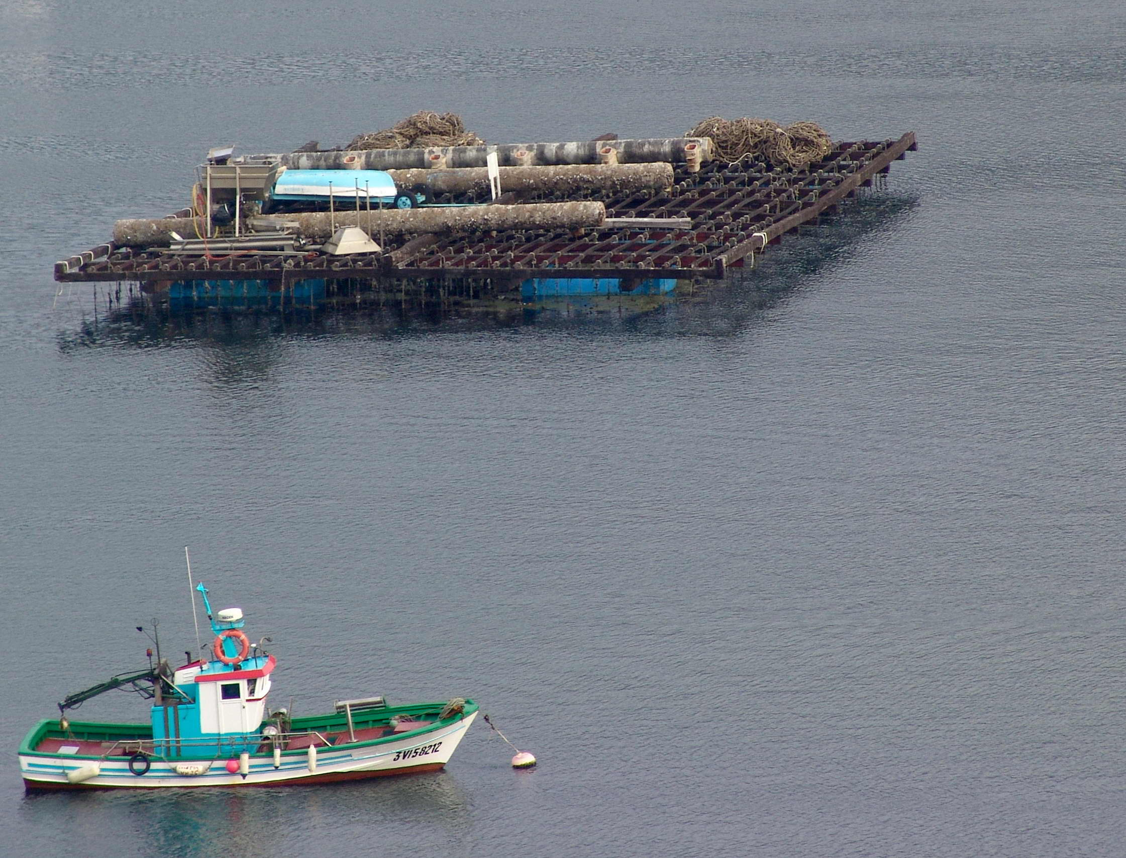 Ría de Vigo, Galicia. Publish by= Luis Miguel Bugallo Sánchez.